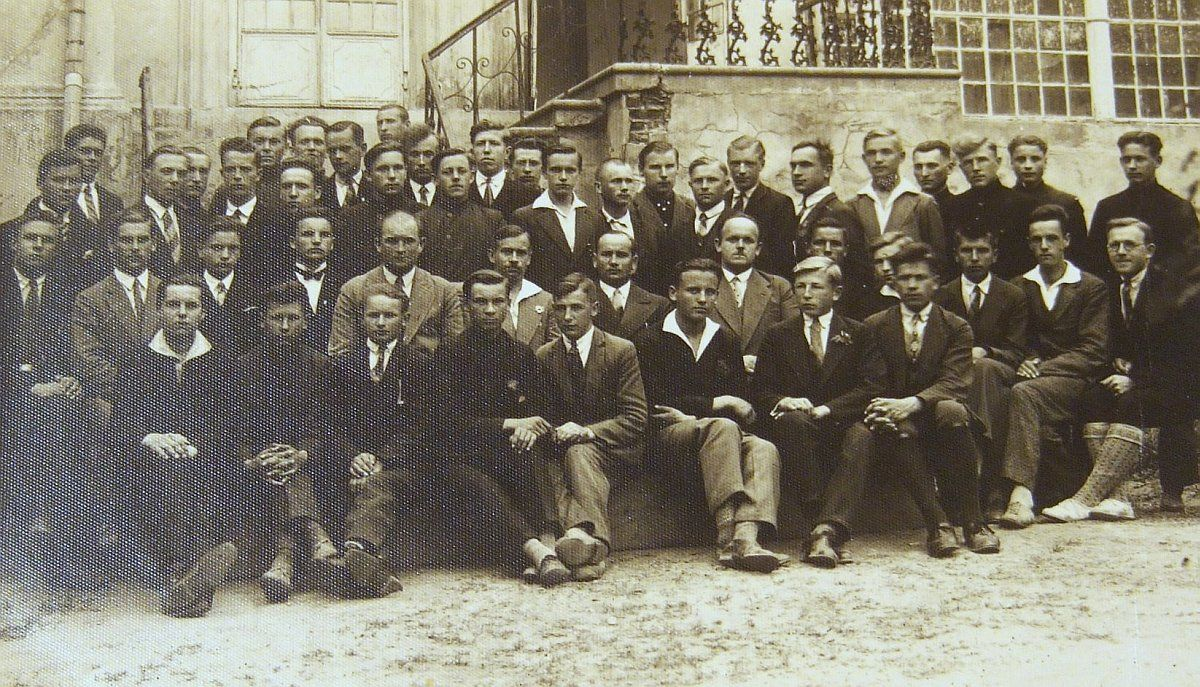 Belvederio mokyklos kontrolasistentų kursai (1931 m.)